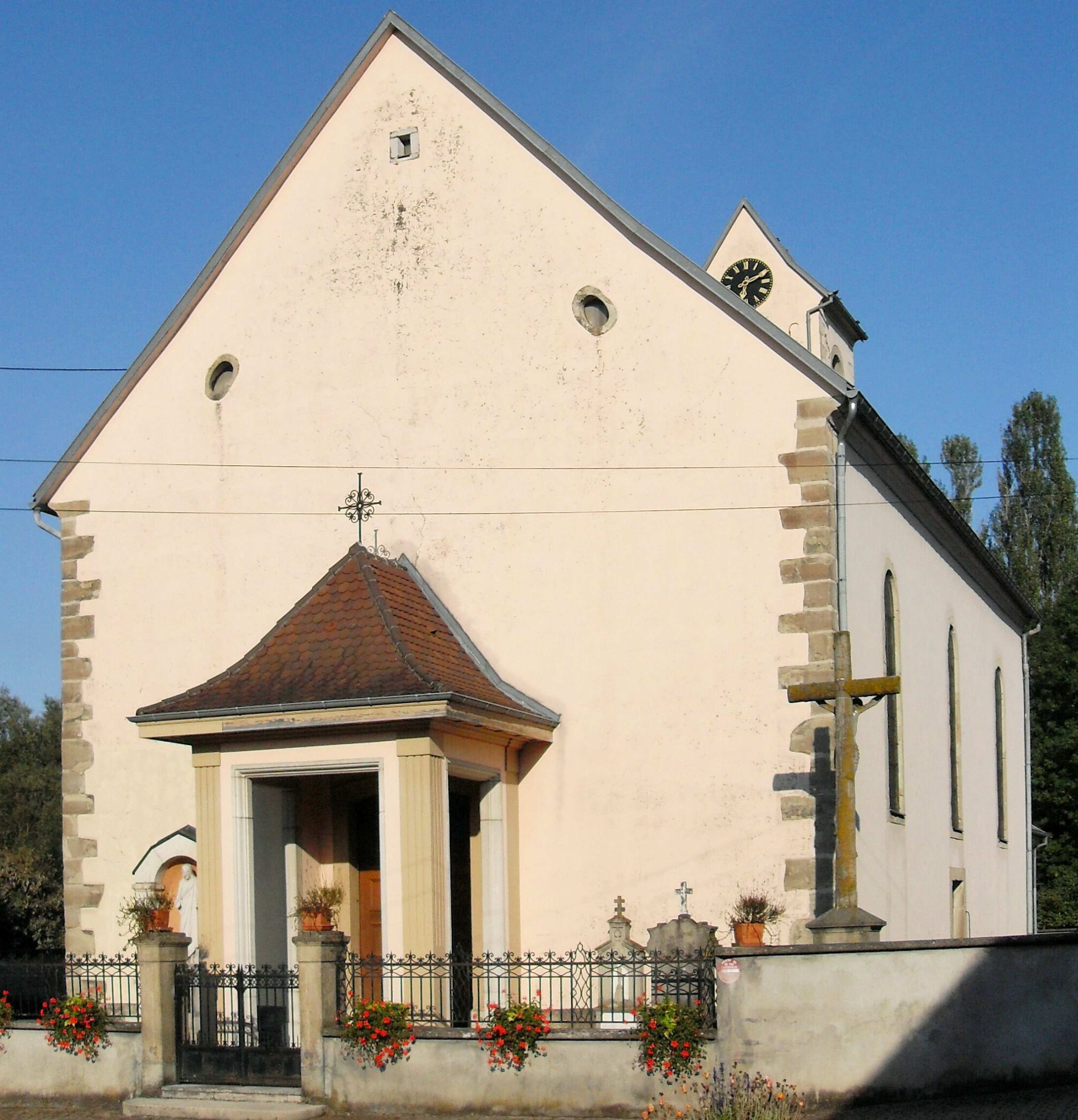 L'église Saint-Léger à Lutter